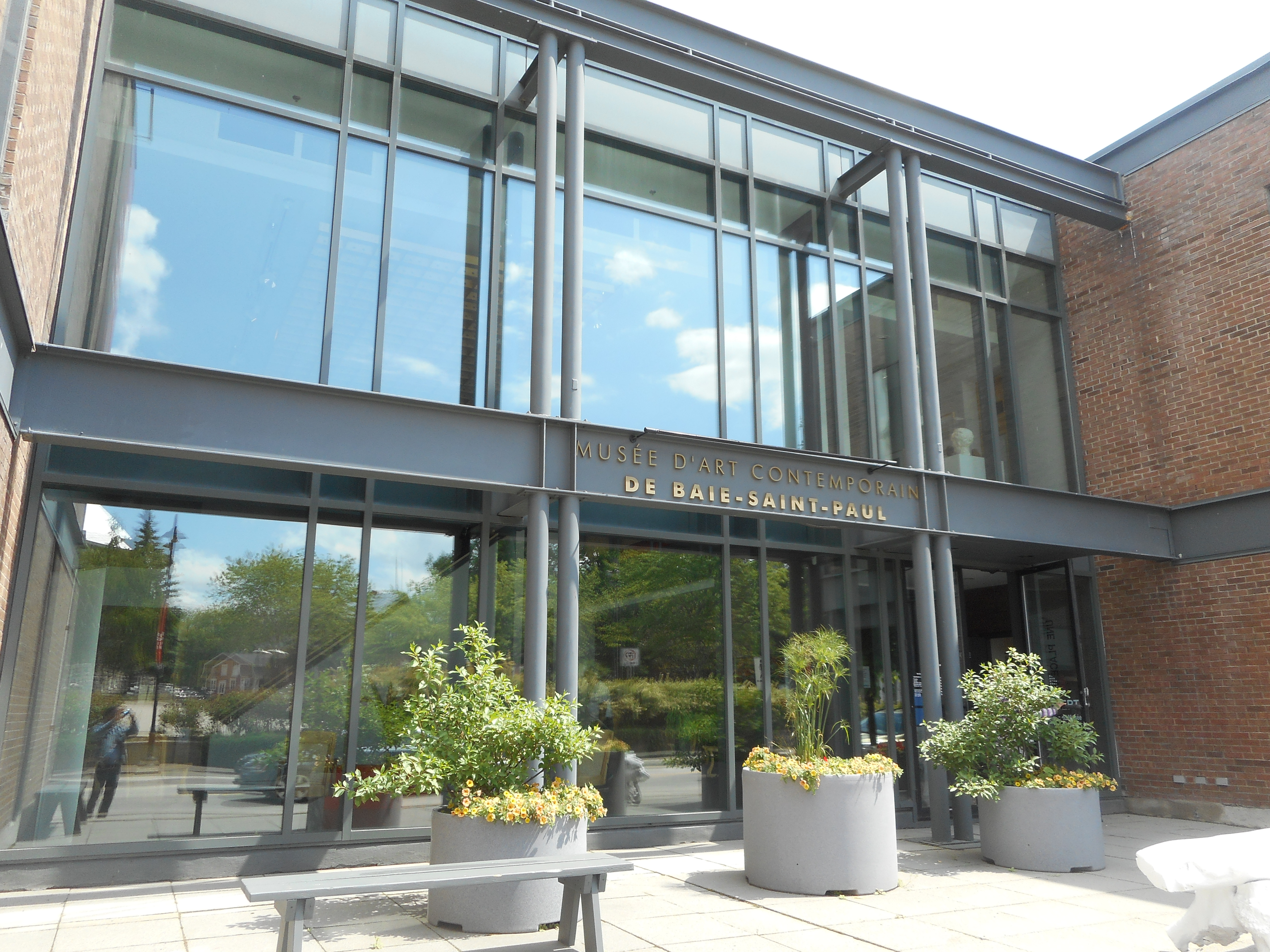 Musée d'art contemporain de Baie-Saint-Paul, 23, rue Ambroise-Fafard, Baie-Saint-Paul